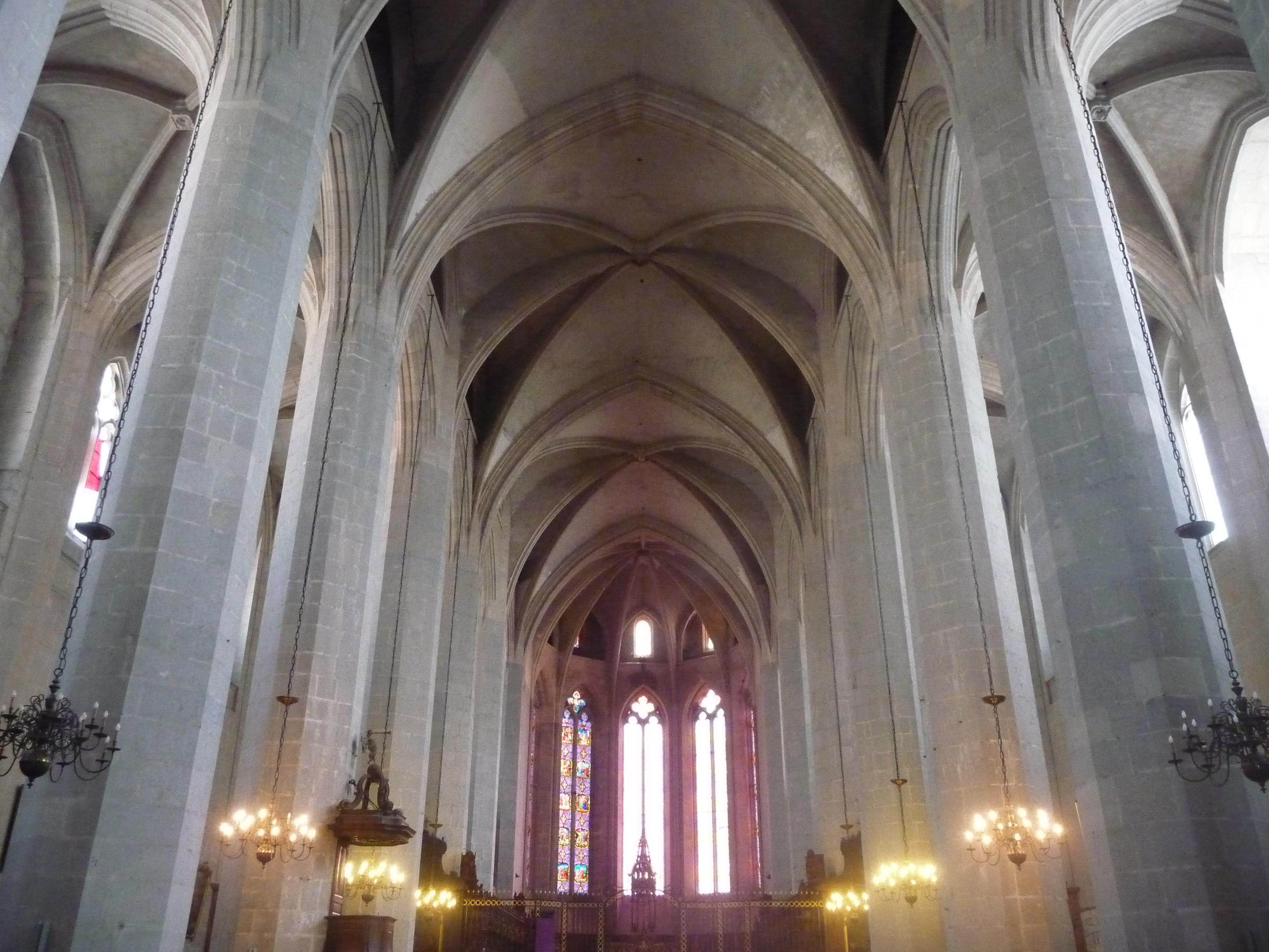 Cathédrale du 14/15ème siècle